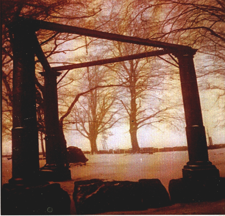 Beispiel eines Galgens aus Beerfelden im Odenwald 1998